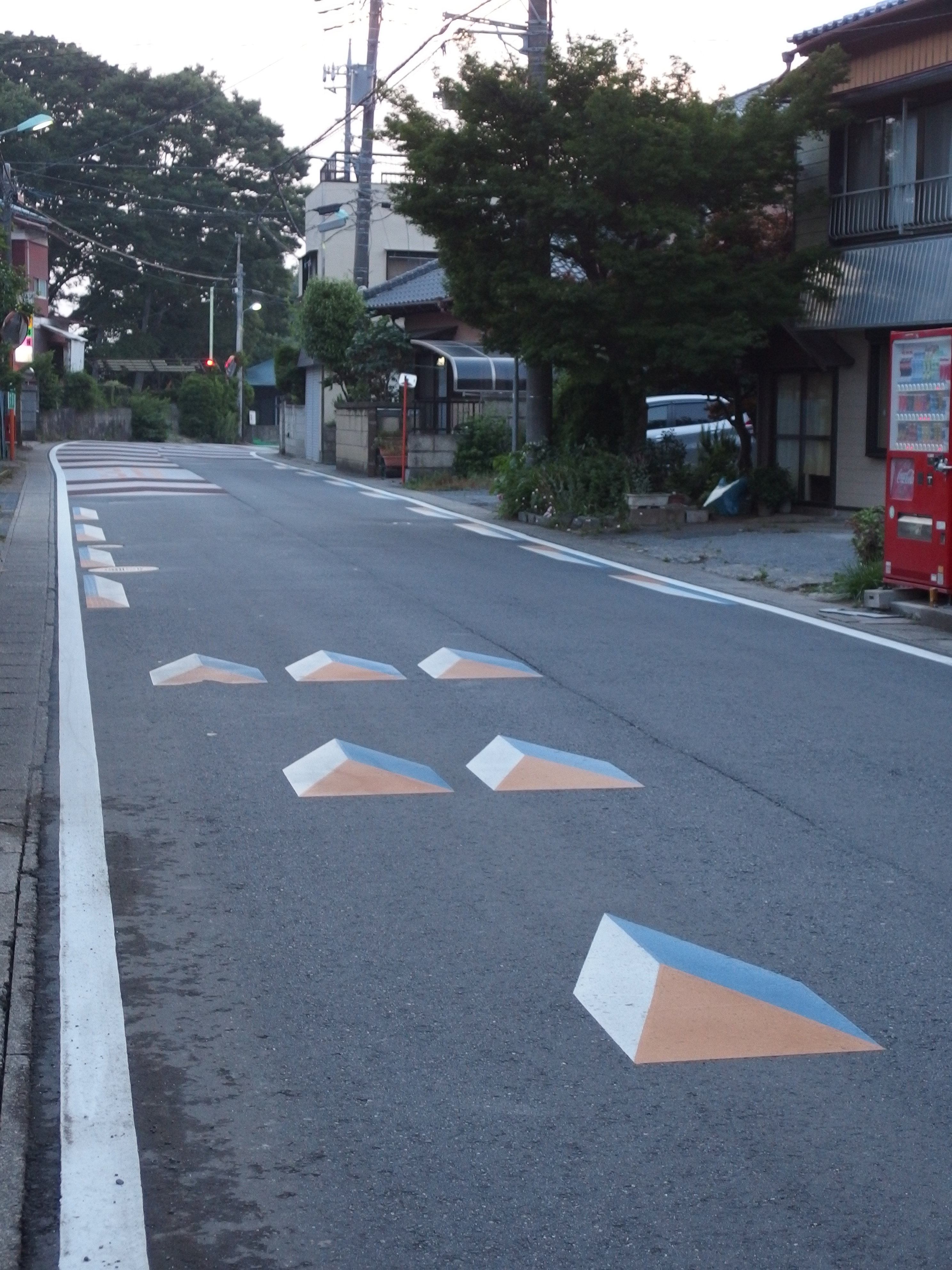 Evening @ Narita